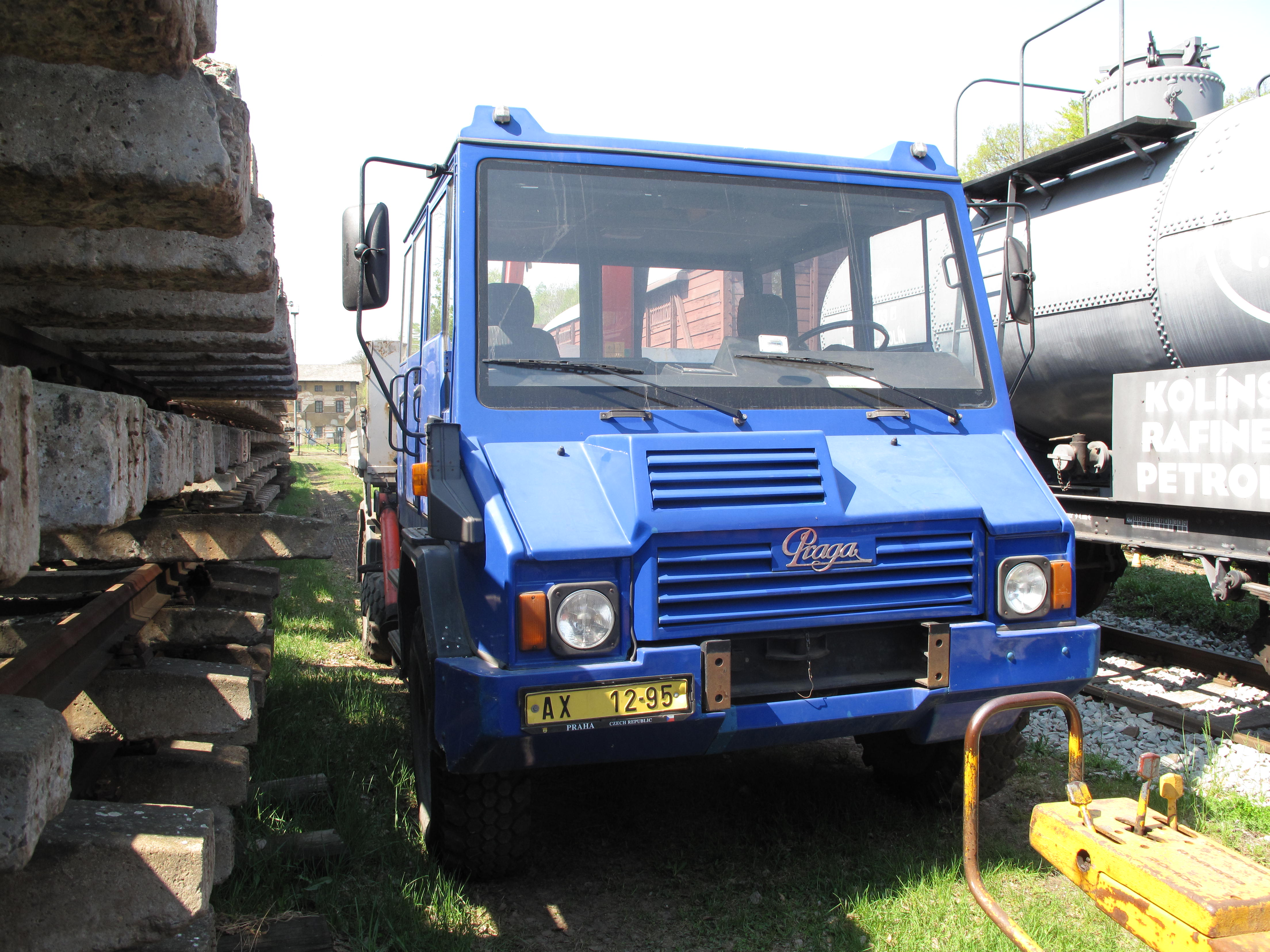 Železniční muzeum Lužná u Rakovníka